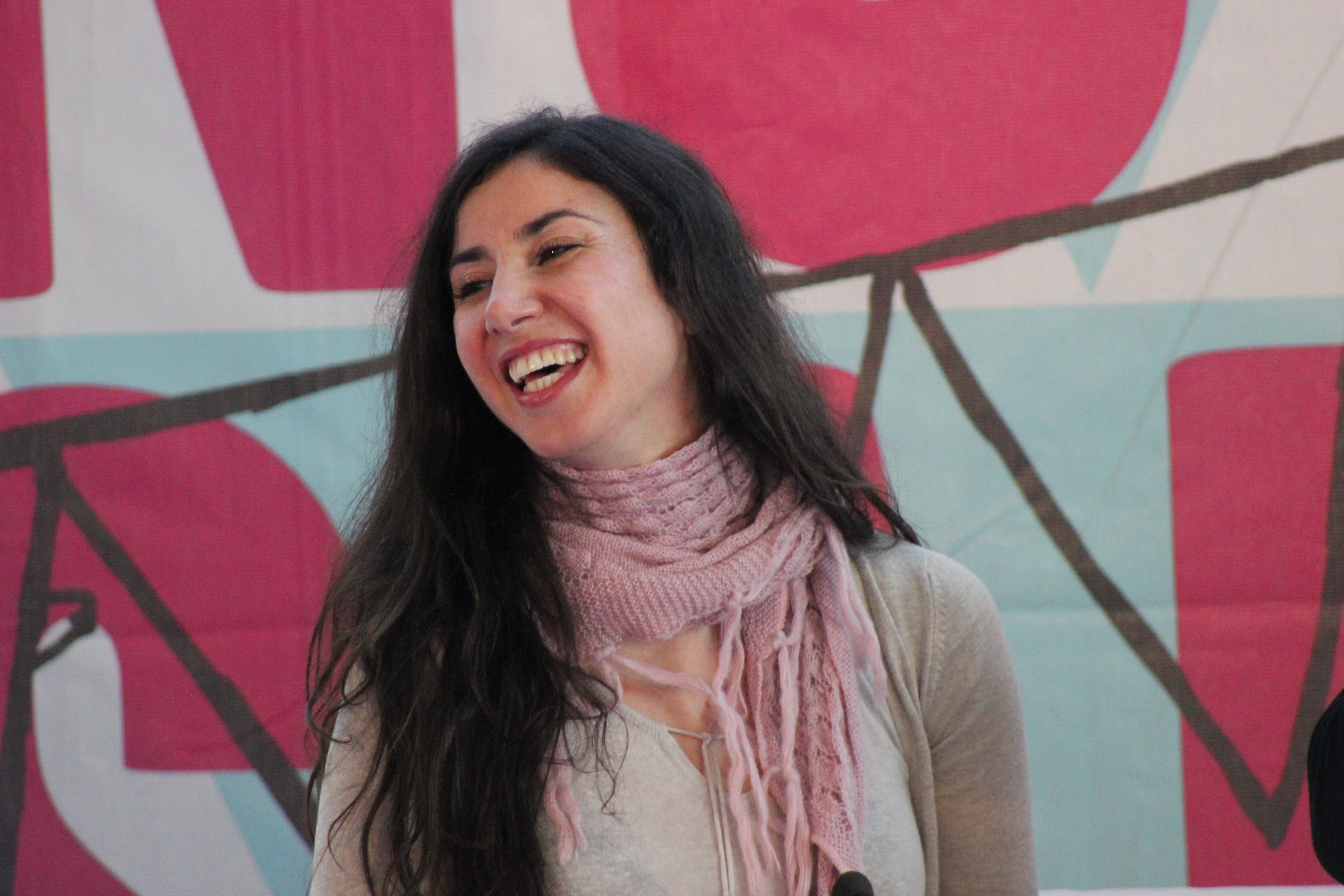 A cantante e compositora galega Najla Shami no Culturgal 2012.